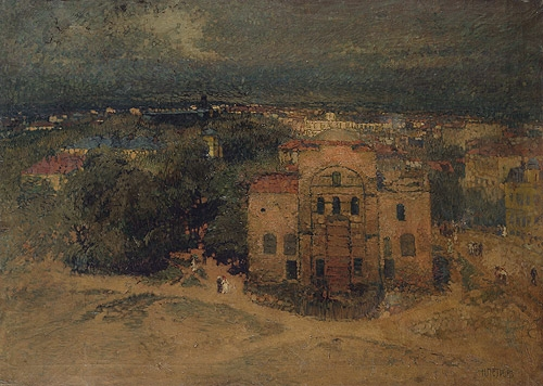 Църквата "Св. София"